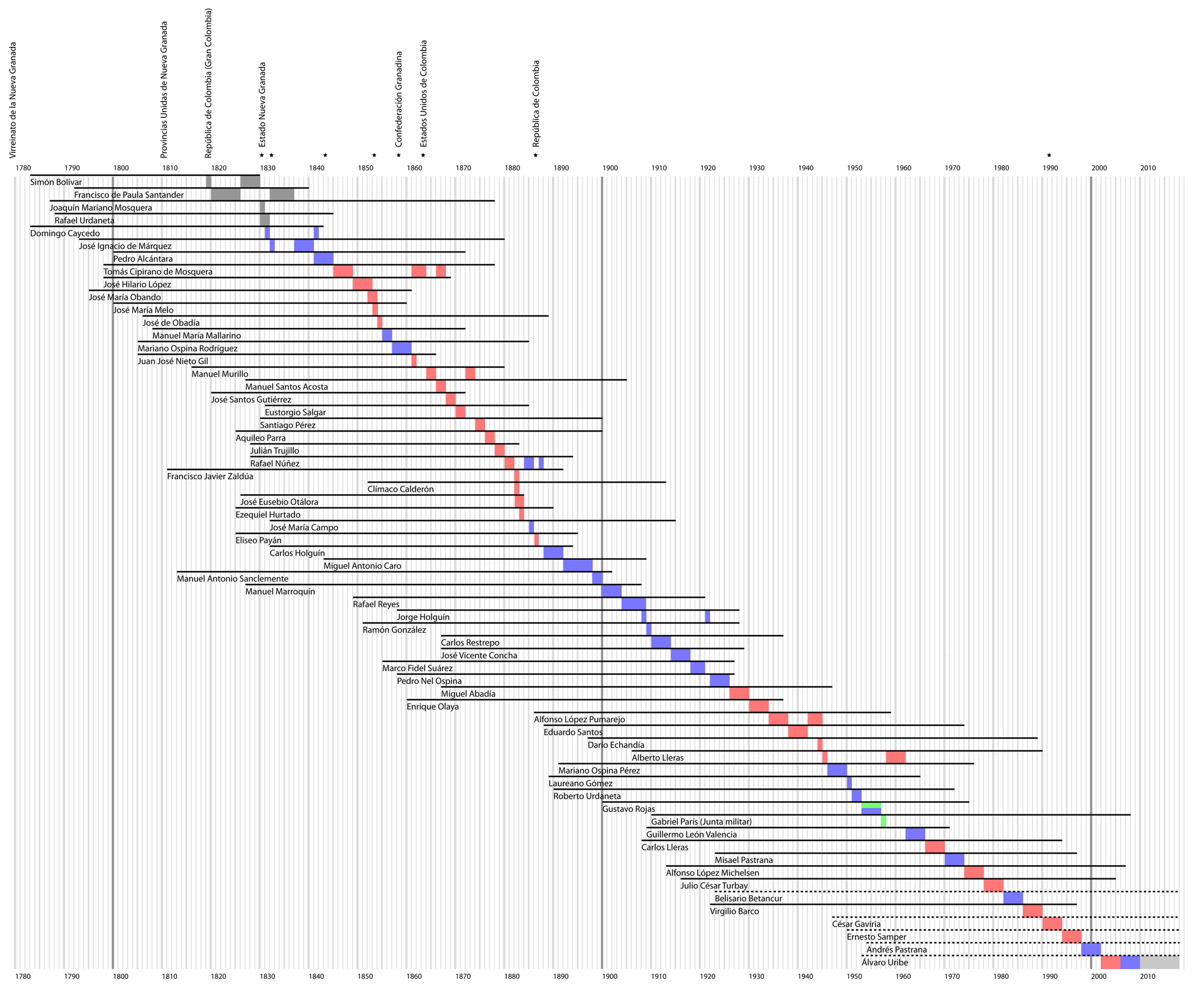 Intento de infografía. Hay más o menos 300 datos de hasta nueve tipos en esta gráfica (nombre, fecha de nacimiento, fecha de muerte, fecha de inicio de periodo, fecha de finalización de periodo, partido político, nombre del país, fecha de constitución), sin contar los datos que se producen al cruzar estos mismos datos independientes. La idea salió, por una parte, de todo el «problema de los expresidentes». Quería saber qué tantos expresidentes les había tocado «padecer» a los presidentes mientras ocuparon el cargo. También quería saber qué edad tenía cuando llegaban a la presidencia y a qué edad se iban por fin de este mundo: los últimos cuatro presidentes han sido todos unos cagones si se comparan con otros. Algunos datos no están representados de manera fiable (periodos muy cortos, por ejemplo). Dependiendo de la fuente, además, salen más y más personajes que fueron presidentes por veinte minutos. ¿Vale la pena contarlos cuando la información se presenta a esta escala? No sé, díganme. También los invito a anotar las tendencias interesantes que vea. Mejor dicho, sus hipótesis. Supongo que quedará mejor cuando lo hagamos (con Cavorito) en Processing y las barras bailen y brillen. Actualización: Esta es la versión de Cavorito con el dataset corregido (aunque no bien del todo. Click aquí para verlo más grande. Click aquí para el dataset (+700 datos). En algunos comentarios me dicen que pequeño no se entiende. Tal vez no se entienda la letra, pero solo desde esa perspectiva se pueden apreciar las tendencias, los quiebres, etc. Quedan en evidencia los fenómenos que llaman "olimpo radical", "república conservadora" y "hegemonia liberal": el macro frente nacional.